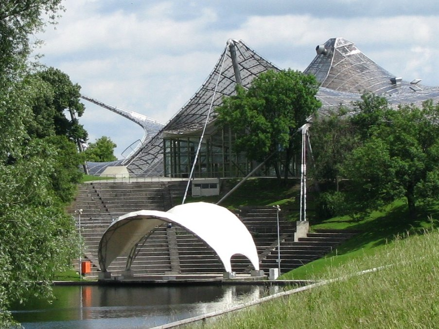 Seebühne vor dem Theatron im Olympiapark München